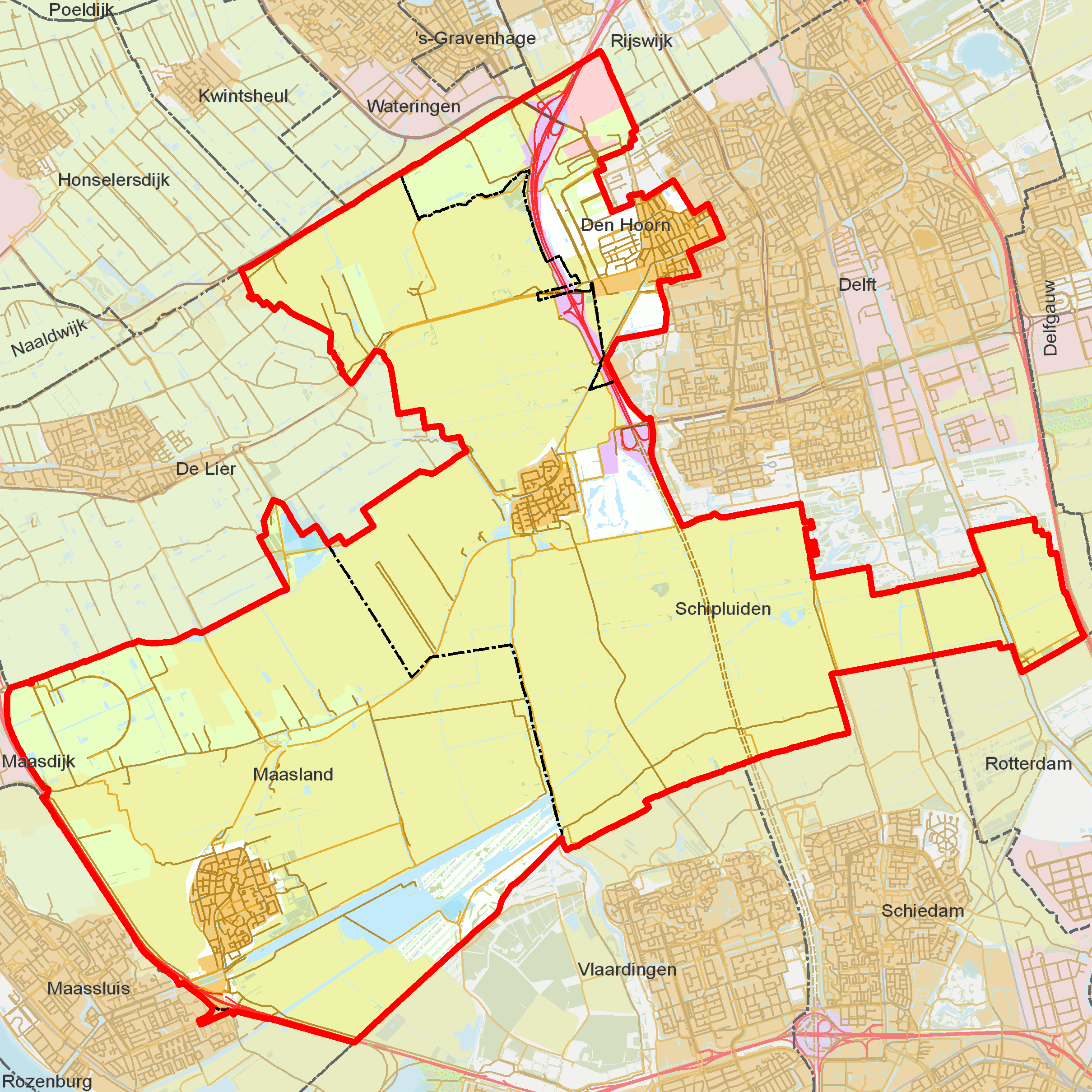 BAG woonplaatsen - Gemeente Midden-Delfland.png